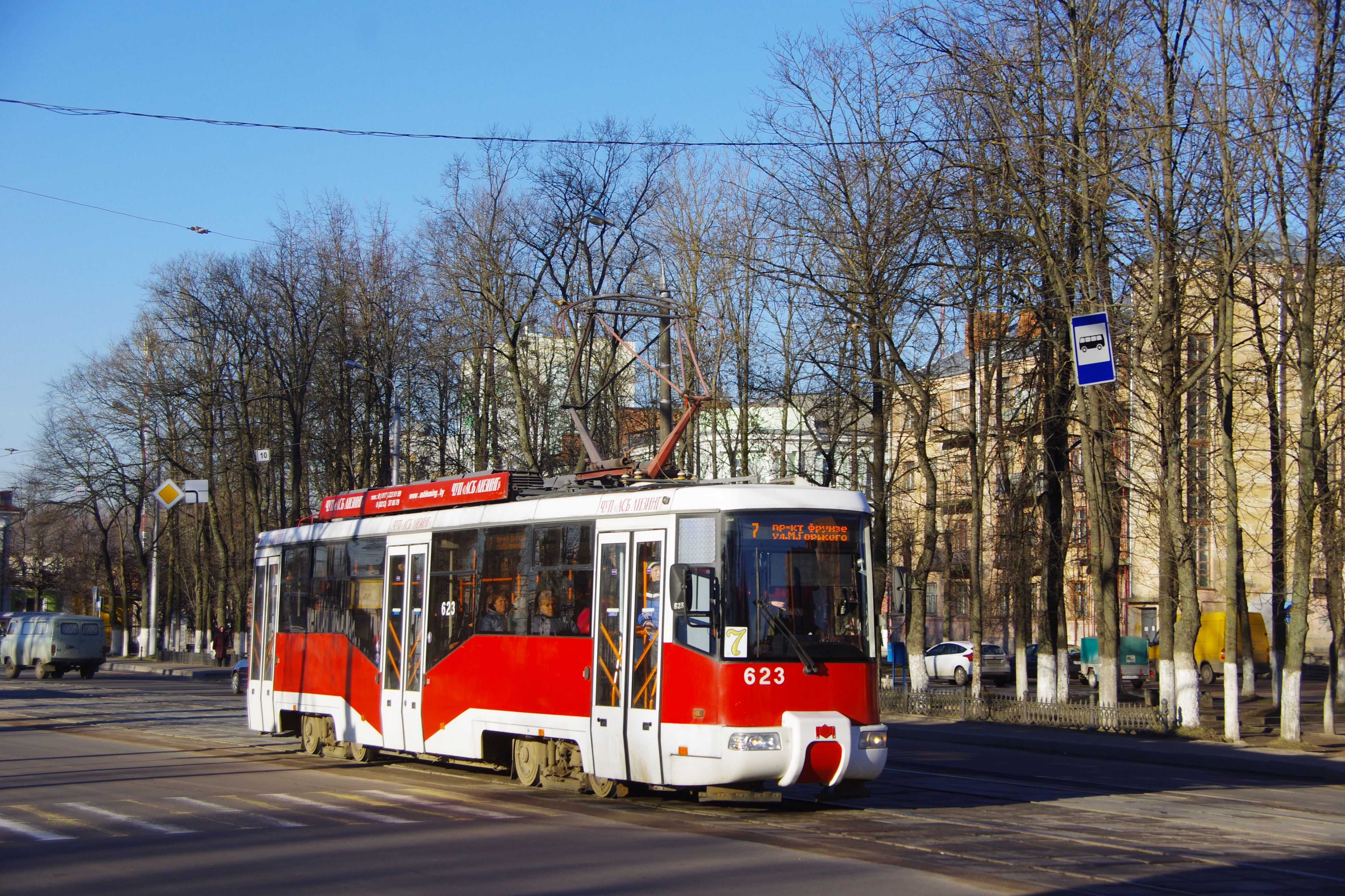 Pieršamajski rajon, Viciebsk, Belarus